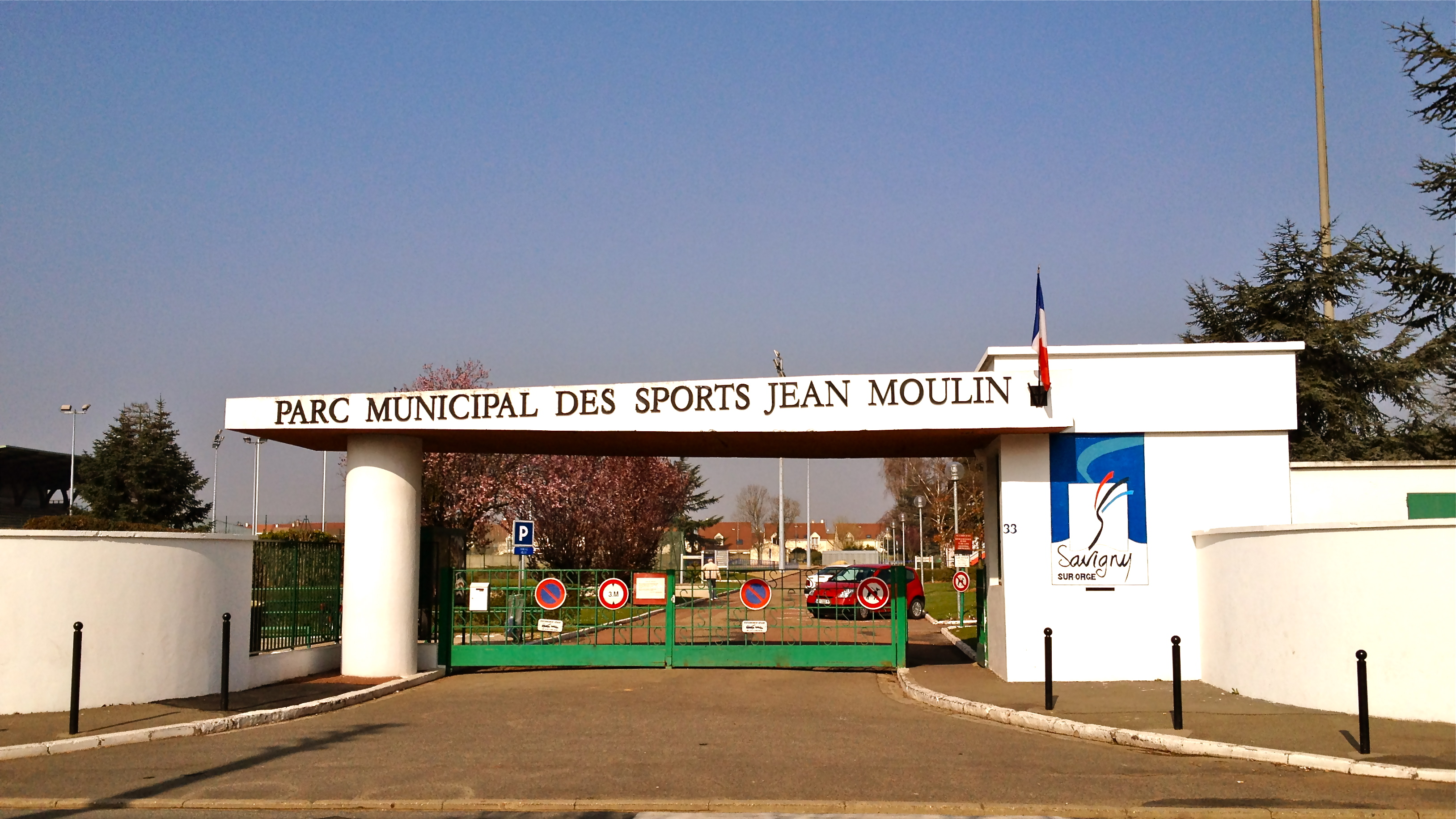 Stade Jean Moulin de Savigny-sur-Orge (Essonne, Île-de-France, France).